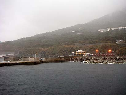 Toshima Port, Toshima, Tokyo, Jp